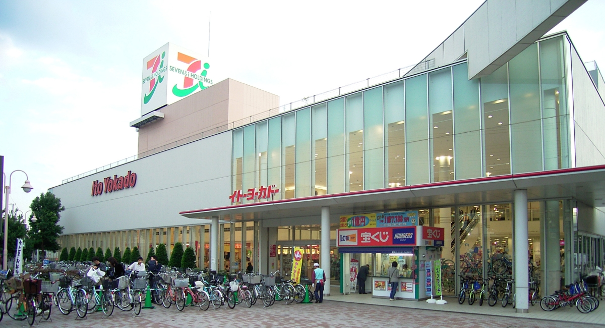 ItoYokado_Higashiyamato,shopping center Tokyo イトーヨーカ堂・東大和店 東大和市桜が丘2-142-1